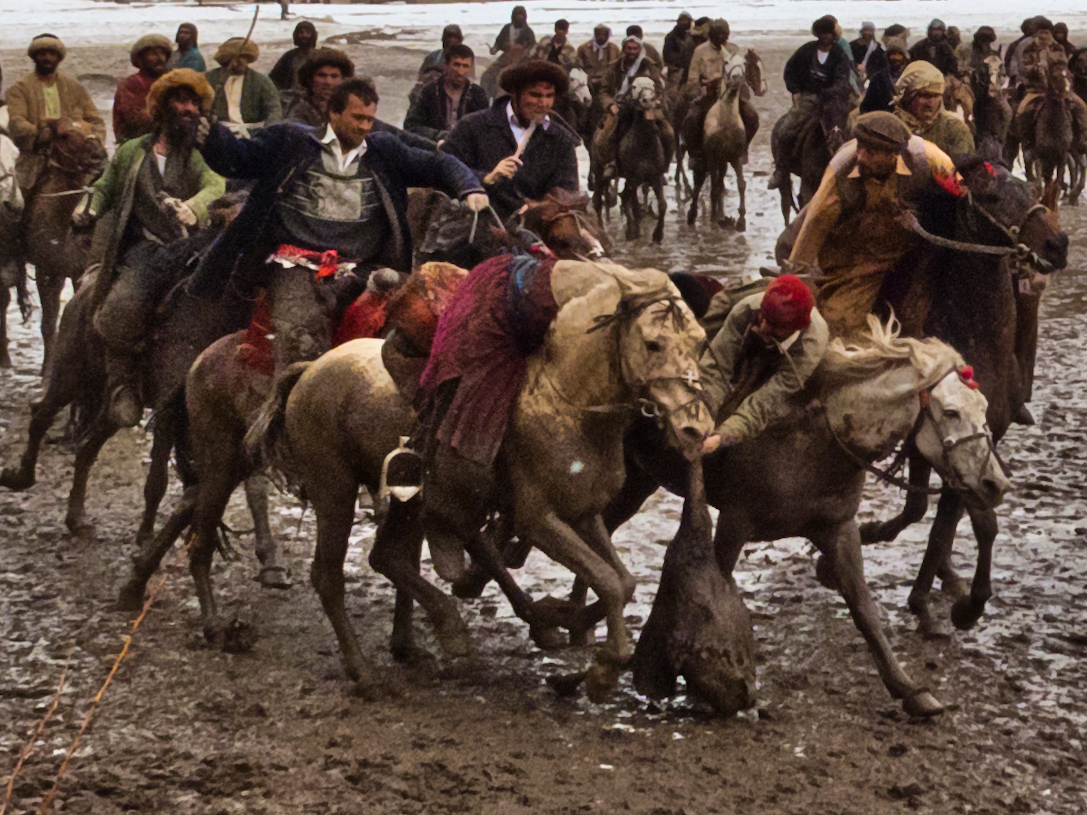 dragging a dead goat